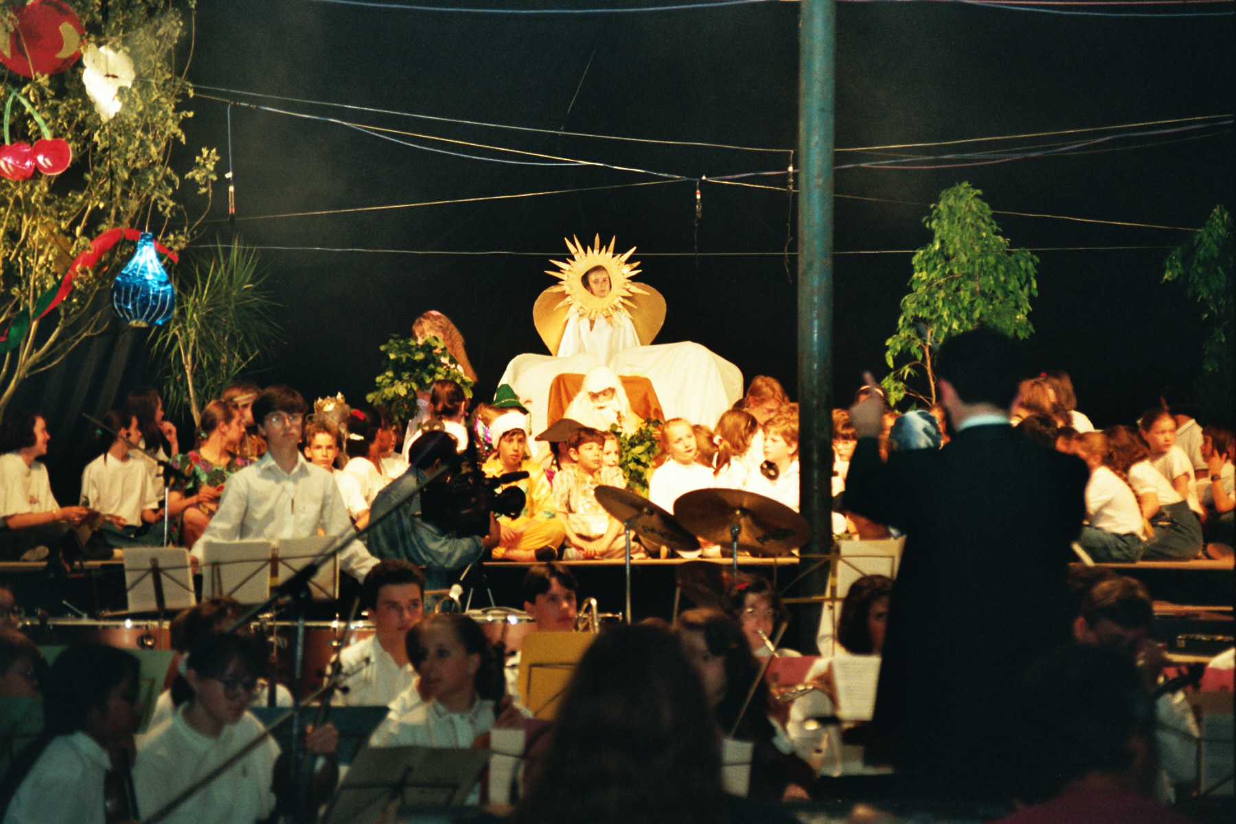 Création spectacle Voyage de Seth 1991 opéra pour enfants